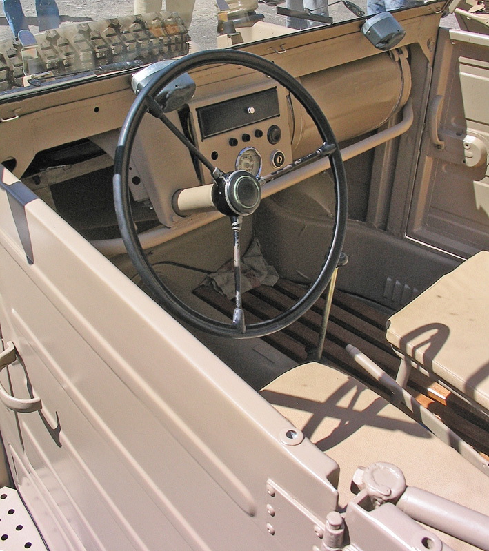 Beschreibung: VW Kübelwagen / Innenraum / Interior Fotograf: Darkone, 2. Juli 2005